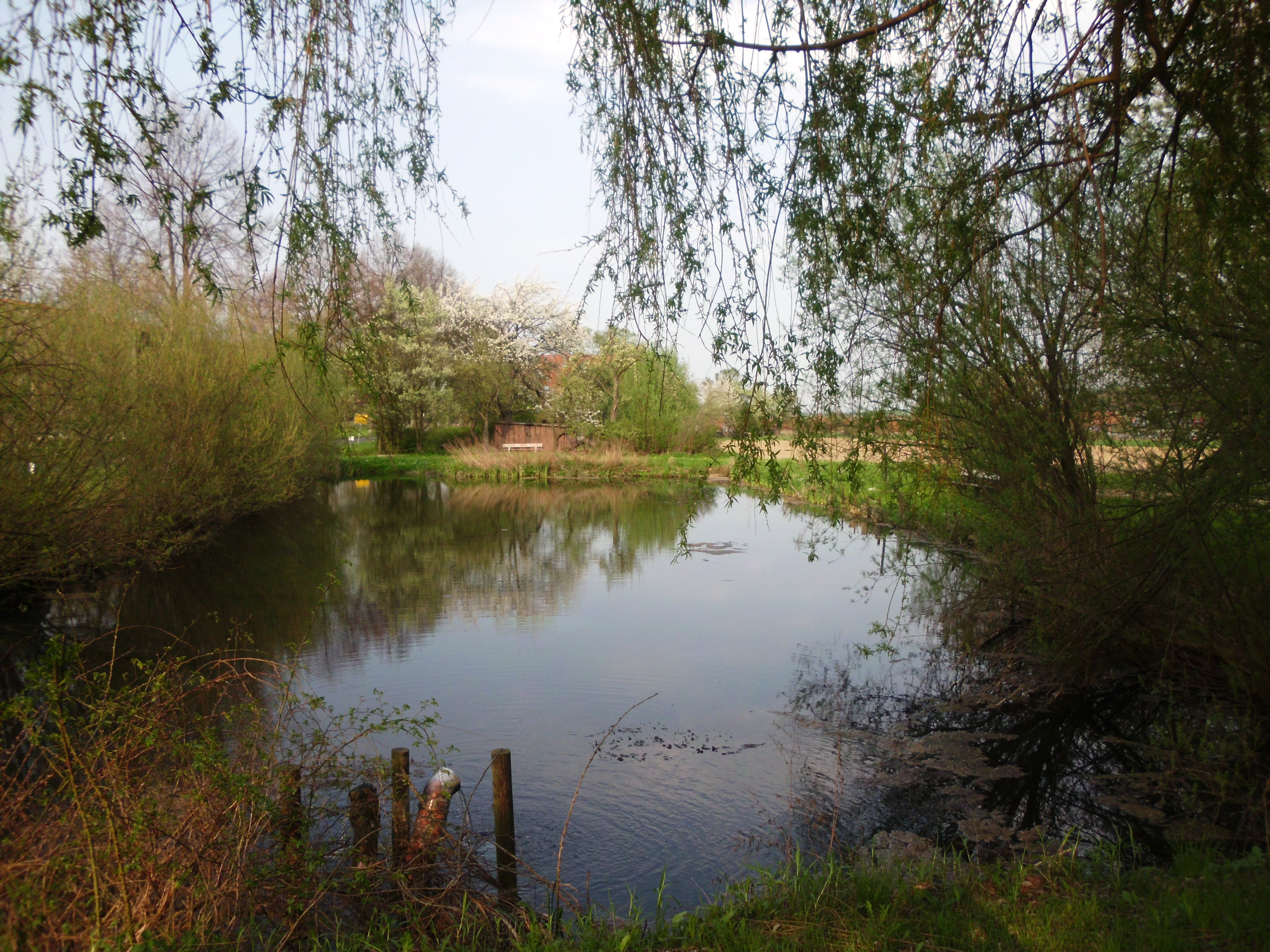 Teich am Ortsrand von Klein Döhren in der Gemeinde Liebenburg